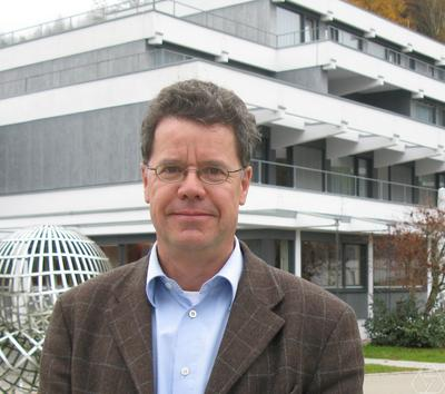 Foto di Ieke Moerdijk